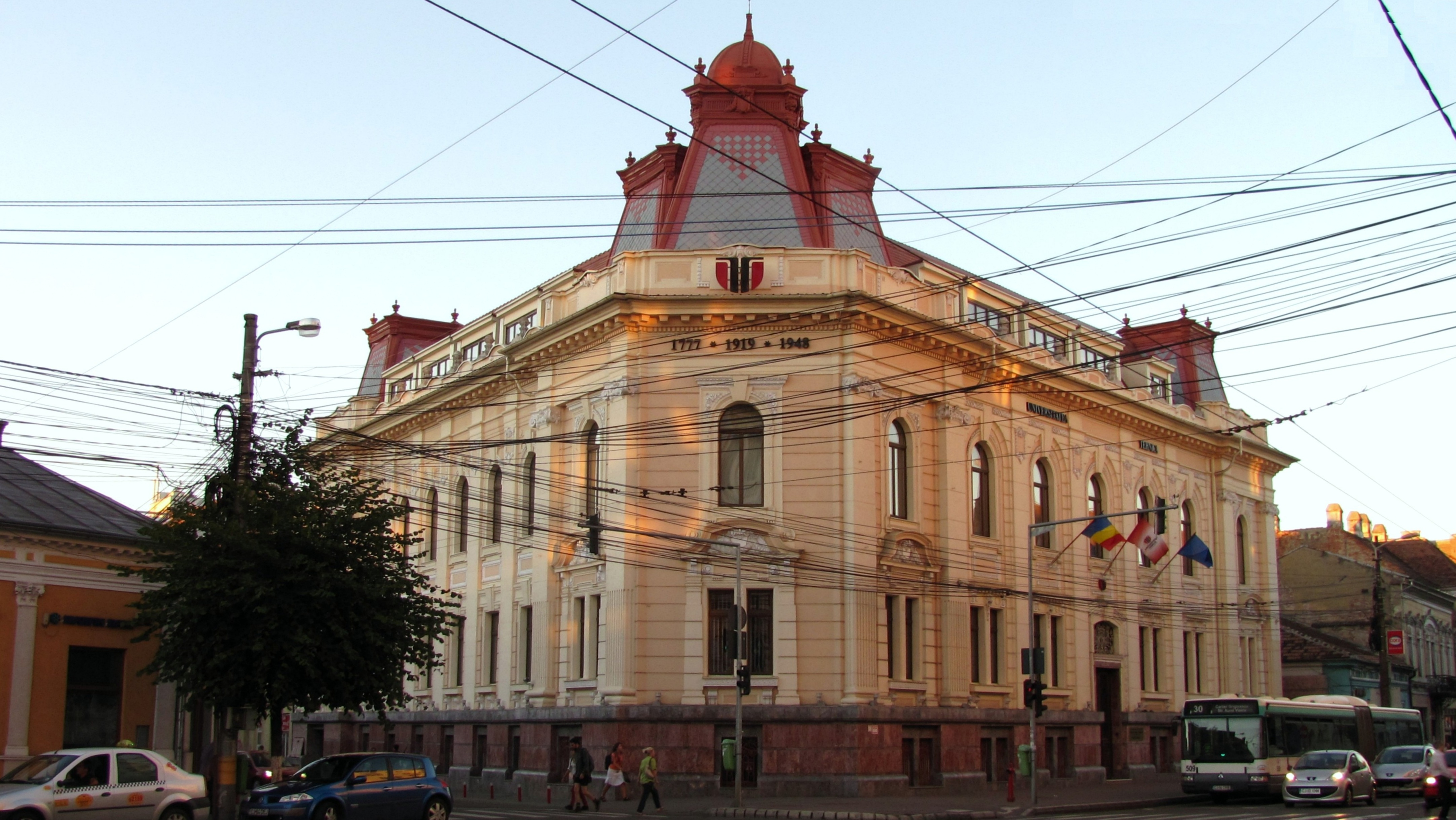 Cluj-Napoca - Str. Emil Isac la intersecţie cu Str. Memorandumului, Nr.28 - Universitatea Tehnică - Rectorat